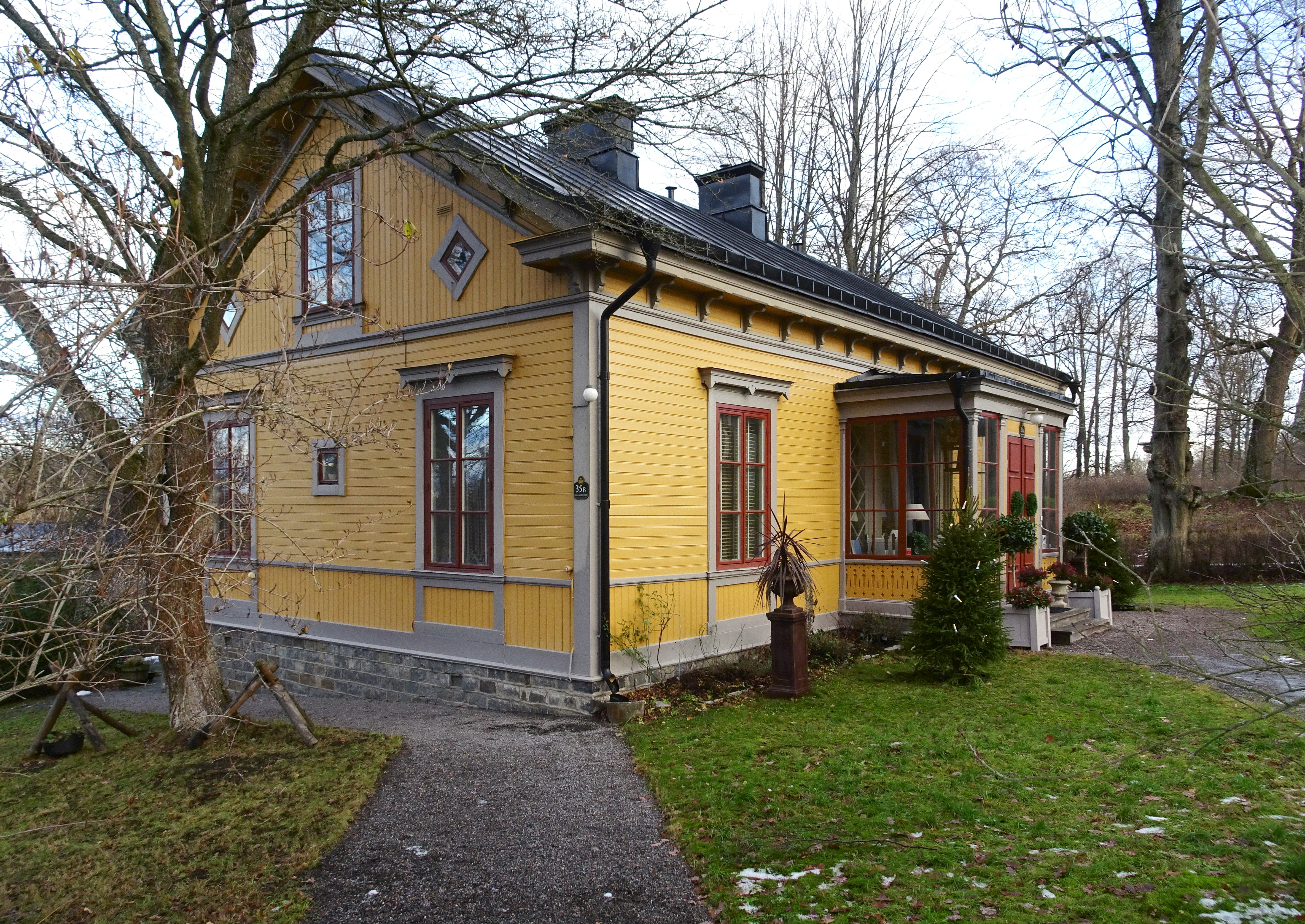 Kavaljersflygeln, Rosendals slott (1880-tal)